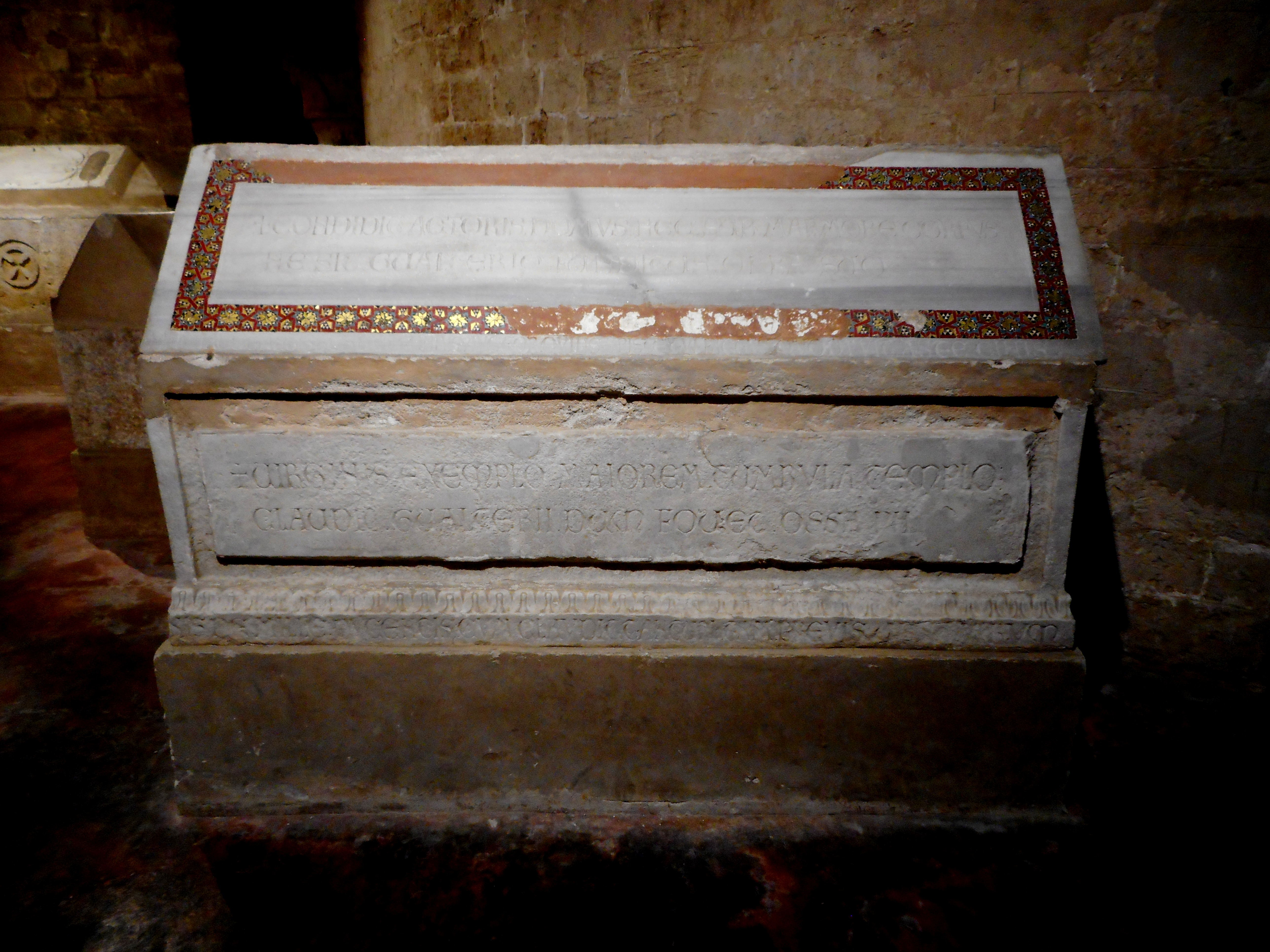 Sarcofago dell'arcivescovo Gualtiero Offamilio nella cripta della Cattedrale di Palermo